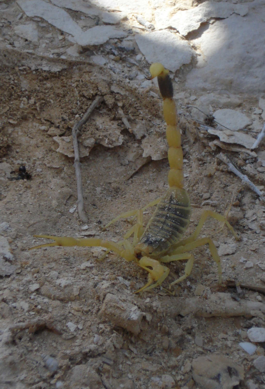 Leiurus quinquestriatus ? Leiurus abdullahbayrami ?.